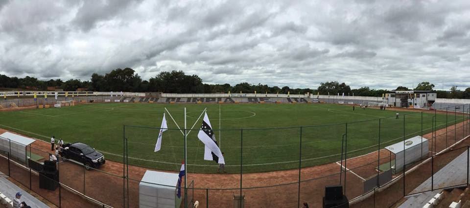 Estadio Presbitero Manuel Gamarra